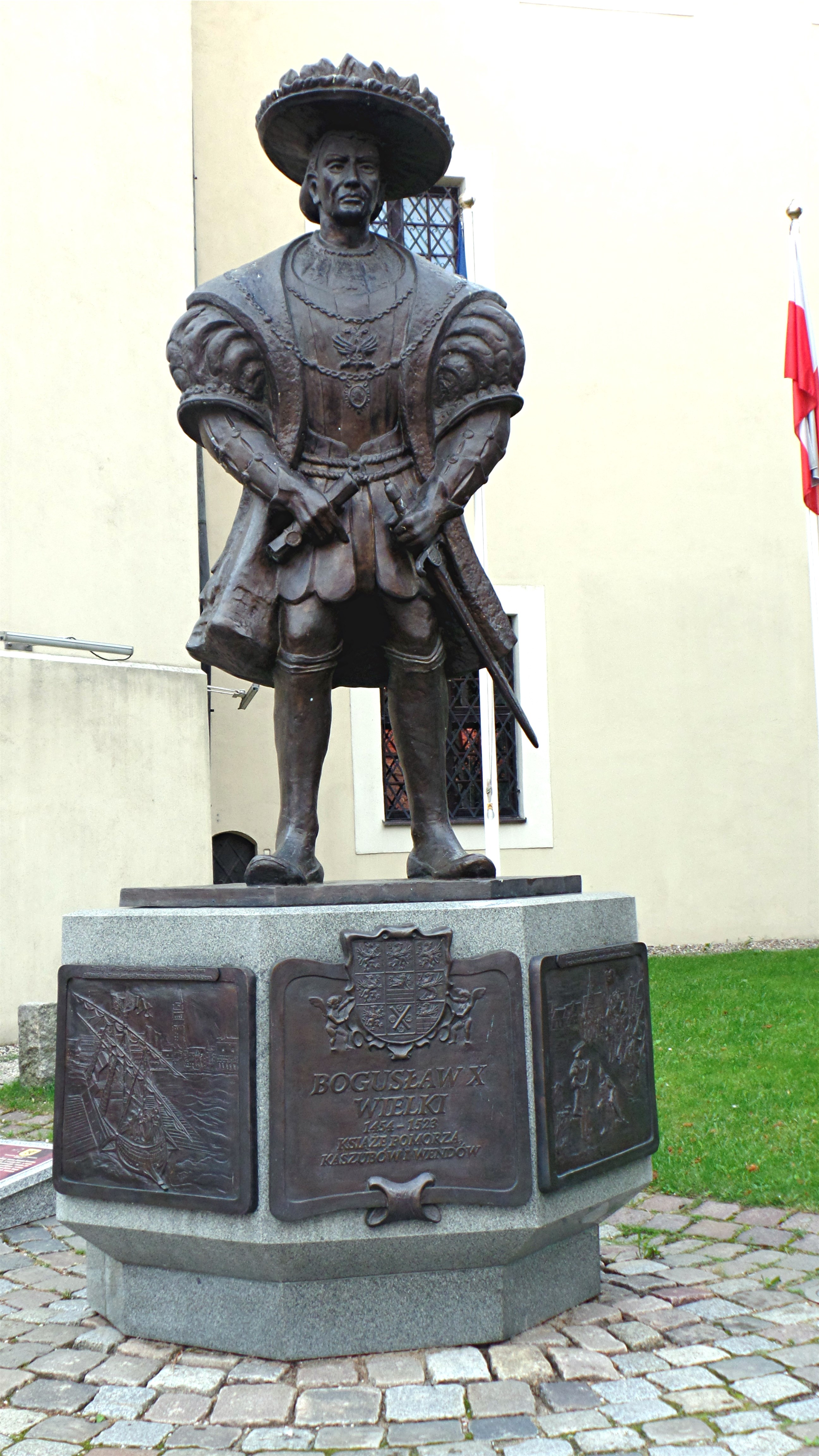 Denkmal von Bogislaw X. vor dem Herzogschloss in Stolp